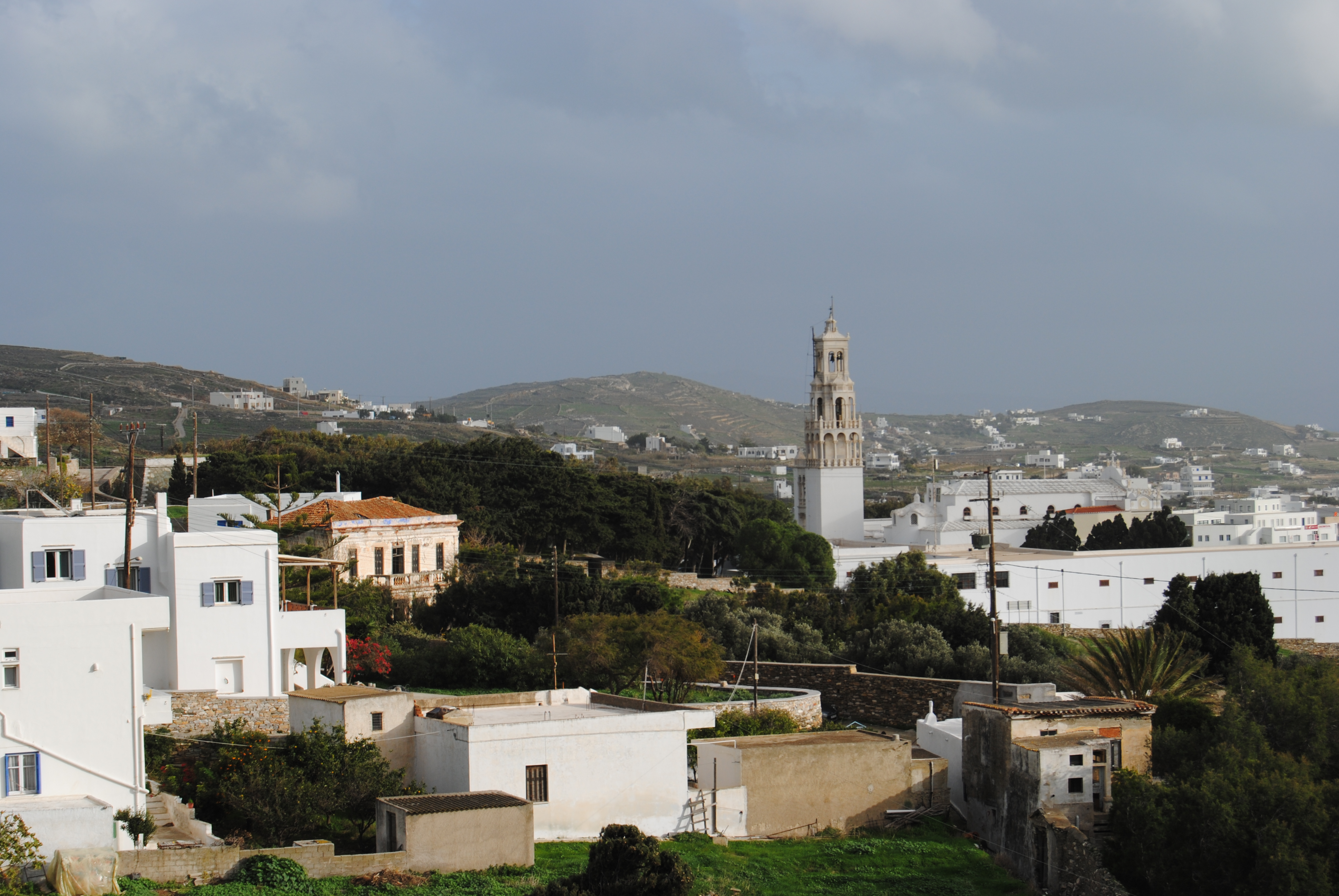 Άποψη της πόλης της Τήνου από την περιφερειακή οδό.